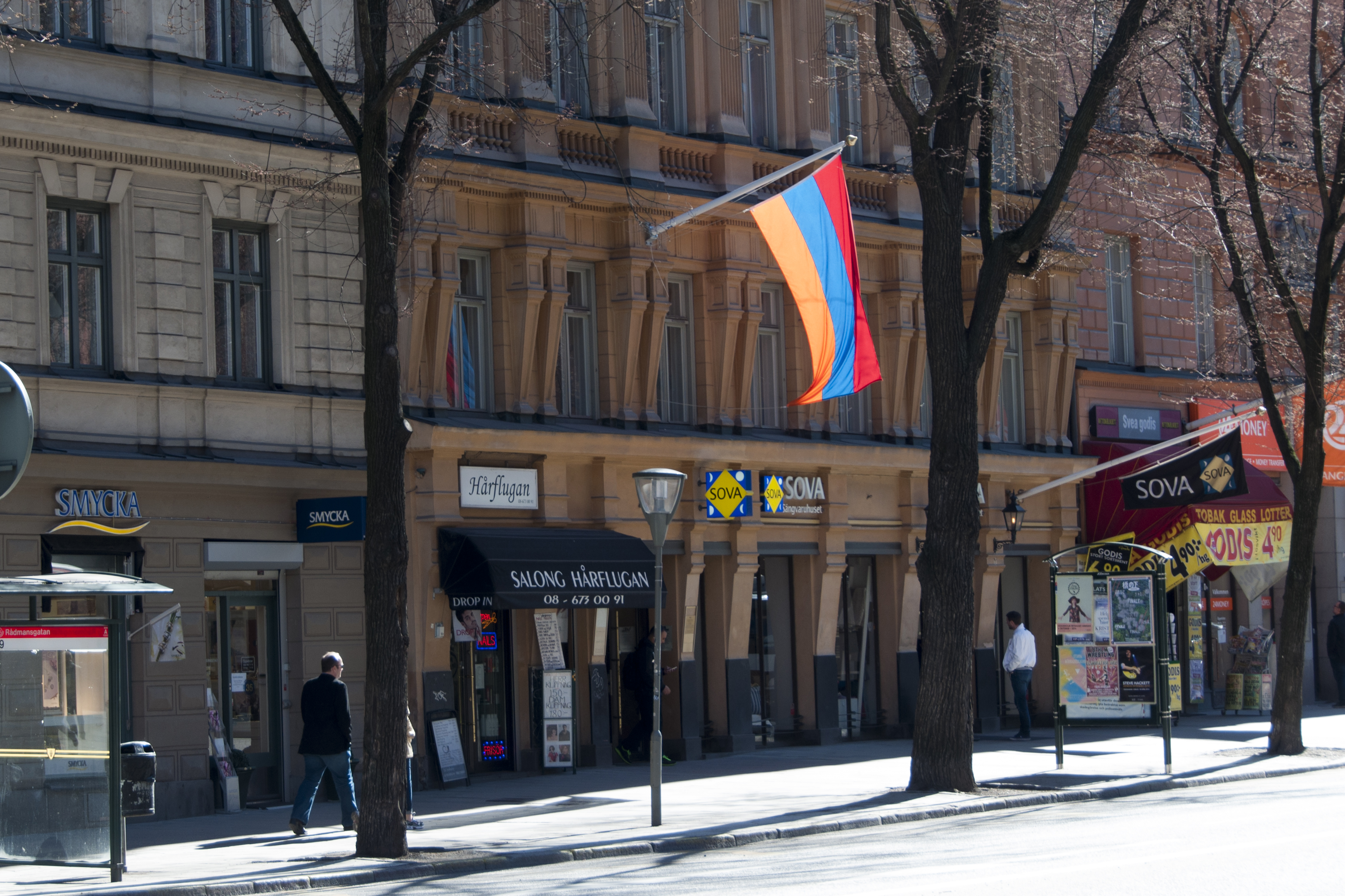 Armenian Embassy in Stockholm, Sveavägen 76